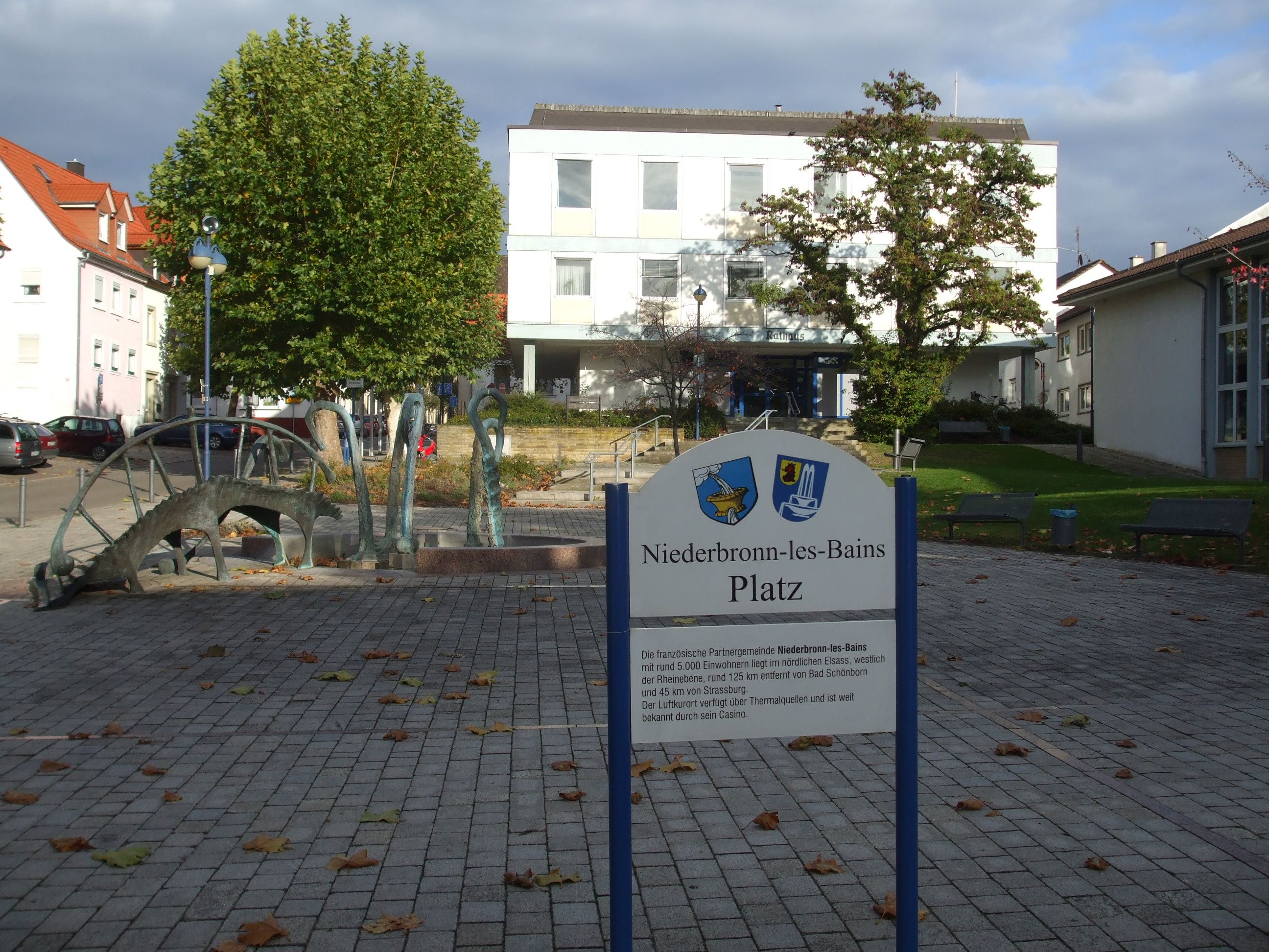 Rathaus in Langenbrücken mit Kunstwerk "Lange Brücke" + Brunnen, und dem Partnerschafts-Schild mit Niederbronn Les Bains.